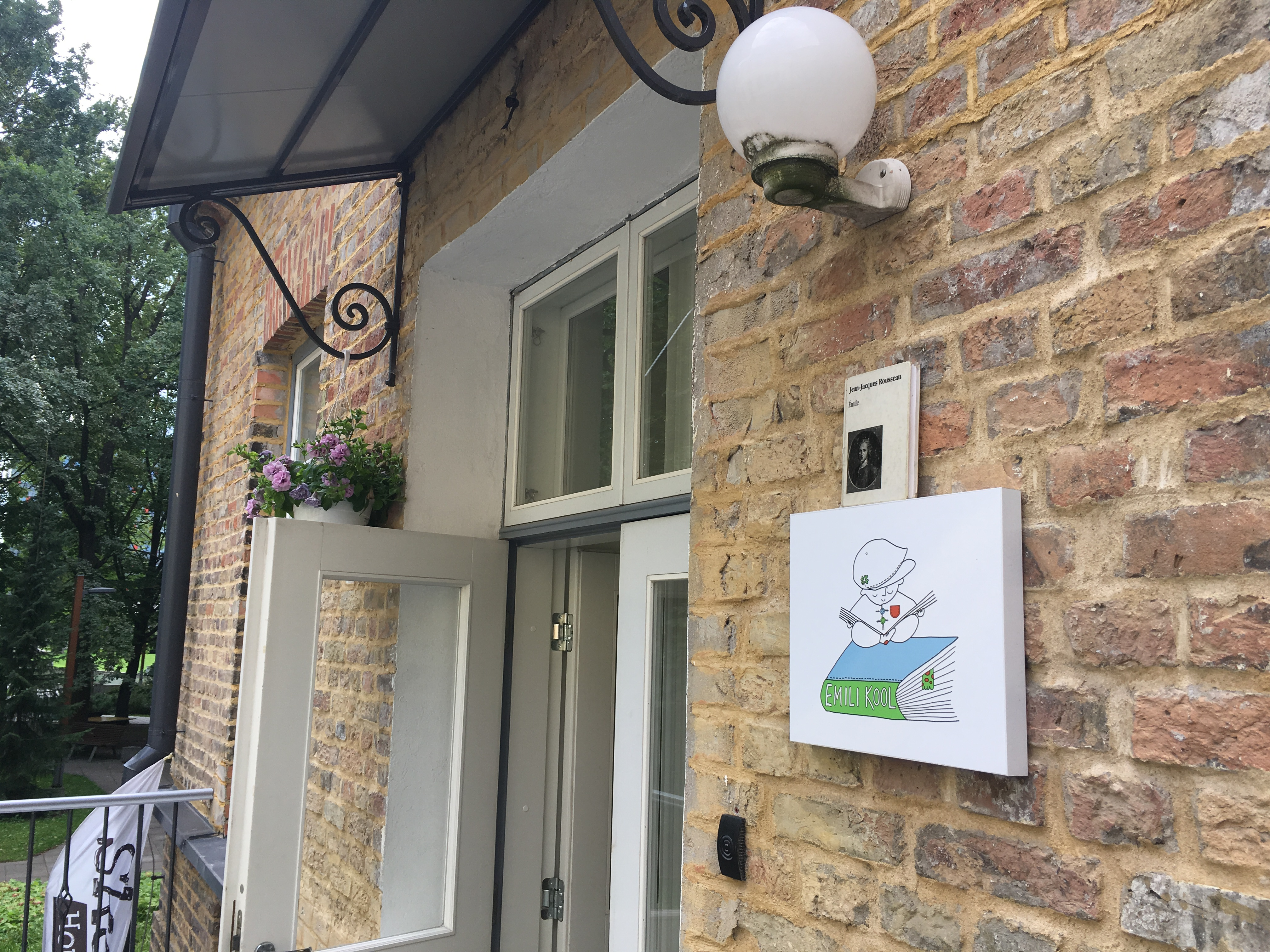 Emili kool aadressil Suur-Sõjamäe 10a, Tallinn